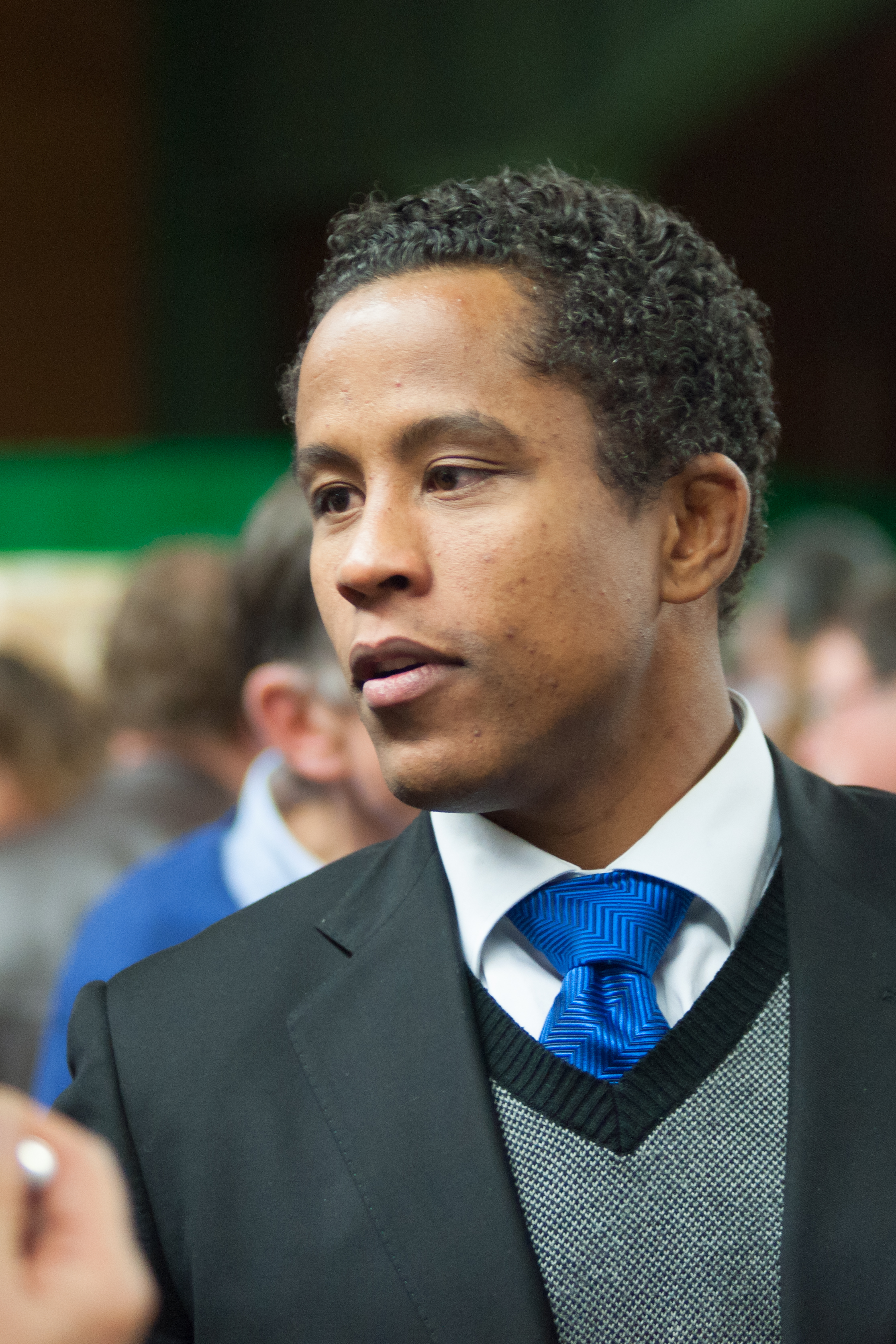 Sergei Aschwanden au mérite sportif vaudois 2014